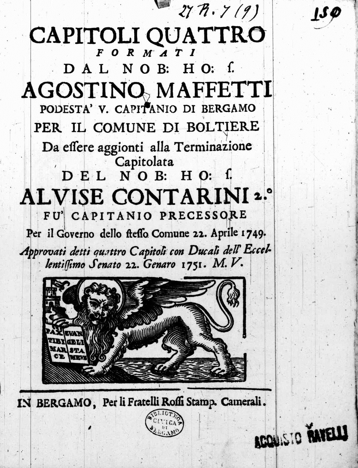 Frontespizio